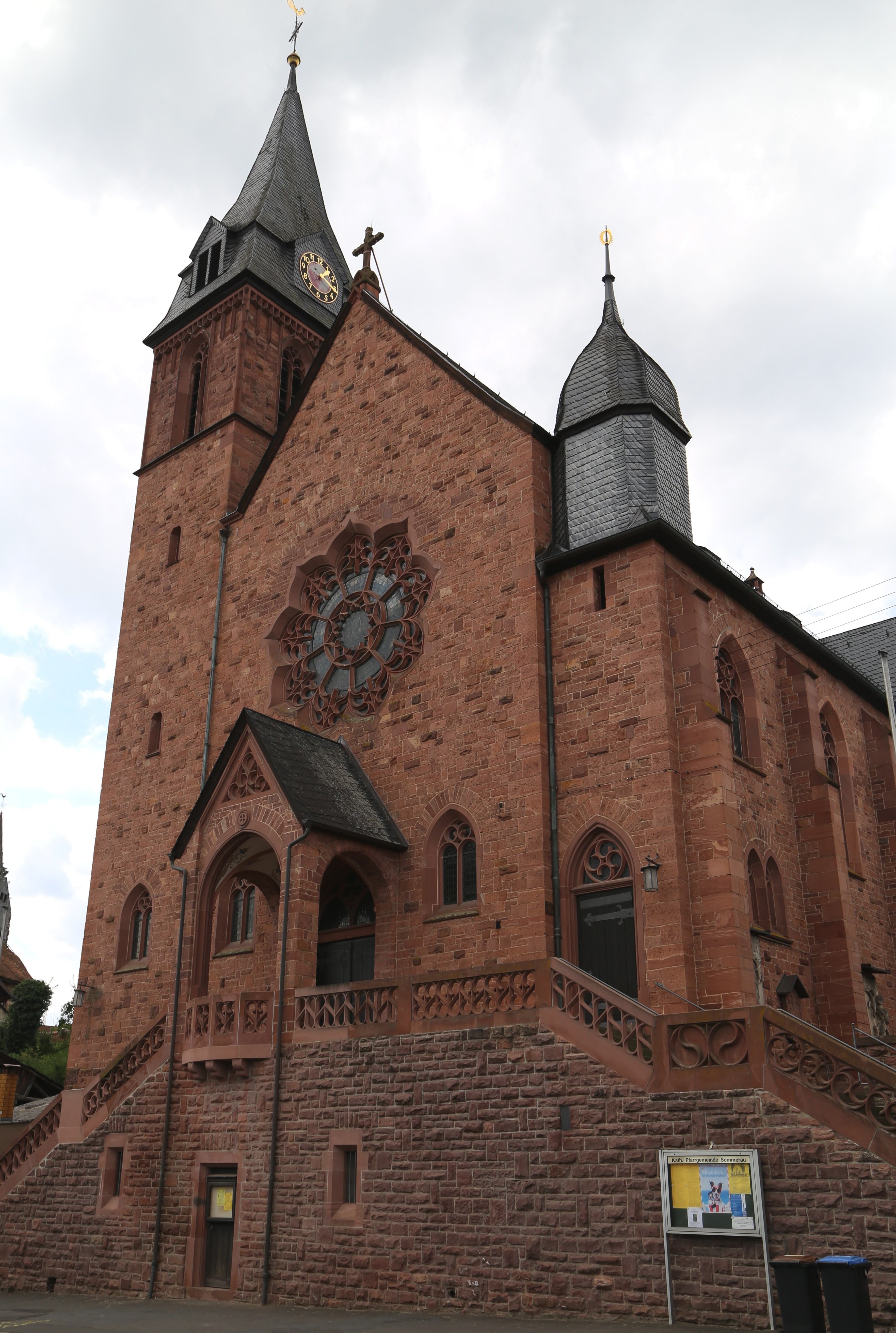 Elsavastraße 125, Eschau, Sommerau; Katholische Pfarrkirche St. Laurentius, dreischiffige Staffelhalle mit eingezogenem 5/8-Chor und angedeutetem Querschiff, Schiefersatteldach, unverputztes Sandsteinquadermauerwerk mit umlaufenden neugotischen Strebepfeilern und Maßwerkfenstern, starke Betonung der asymmetrischen Eingangsfassade durch seitlichen Glockenturm mit verschiefertem Pyramidenhelm und gegenüberliegenden kleineren Treppenturm mit verschieferter Schweifhaube, dazwischen Giebel mit großer Treppenanlage zur offenen Eingangshalle und dominierender Maßwerkrosette, Ludwig Becker, neugotisch, 1913–1923; an den Außenseiten Anbringung von Epitaphien des alten Friedhofes, Sandstein, 16.–19. Jahrhundert